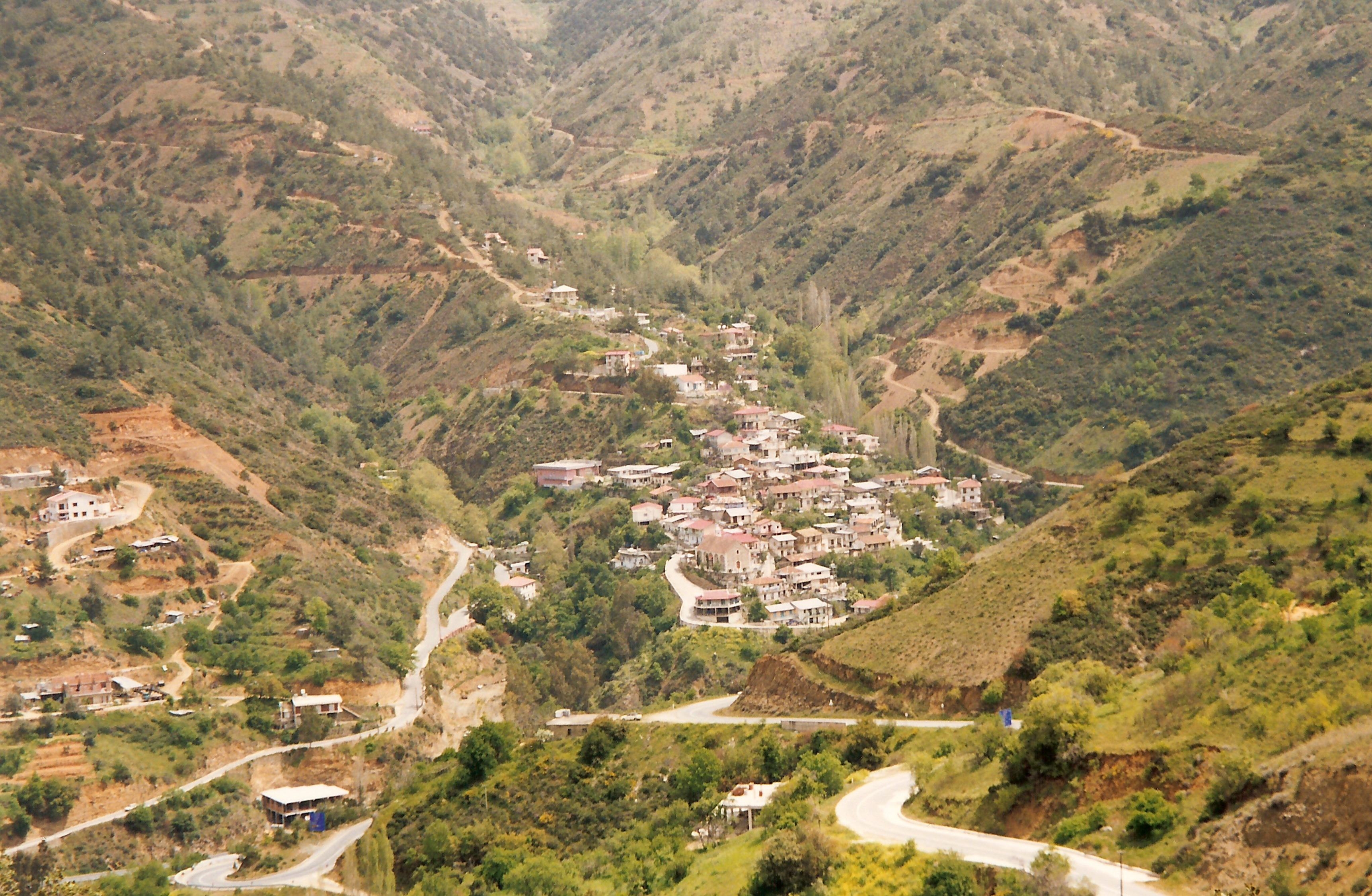 Oikos, Troodos, Zypern